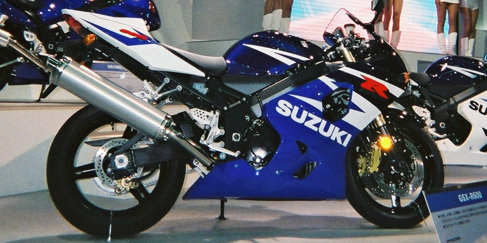 東京モーターショー2003で展示されていたスズキ・GSX-R600